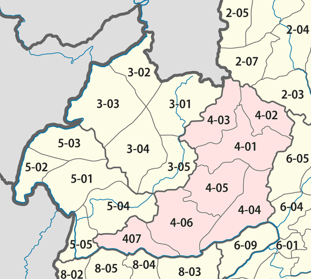 Giấy phép